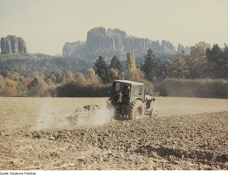 Original image description from the Deutsche Fotothek Der Falkenstein und die Schrammsteinkette von der Hochfläche bei Reinhardtsdorf aus, mit Mehrscharpflug hinter einem Traktor "Pionier"?